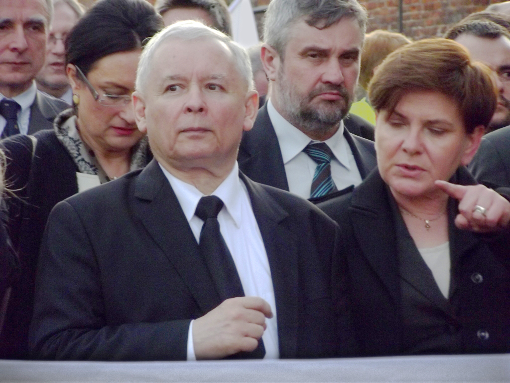 Zdjęcie zrobione podczas trzeciej rocznicy pogrzebu Lecha i Marii Kaczyńskich w Krakowie.